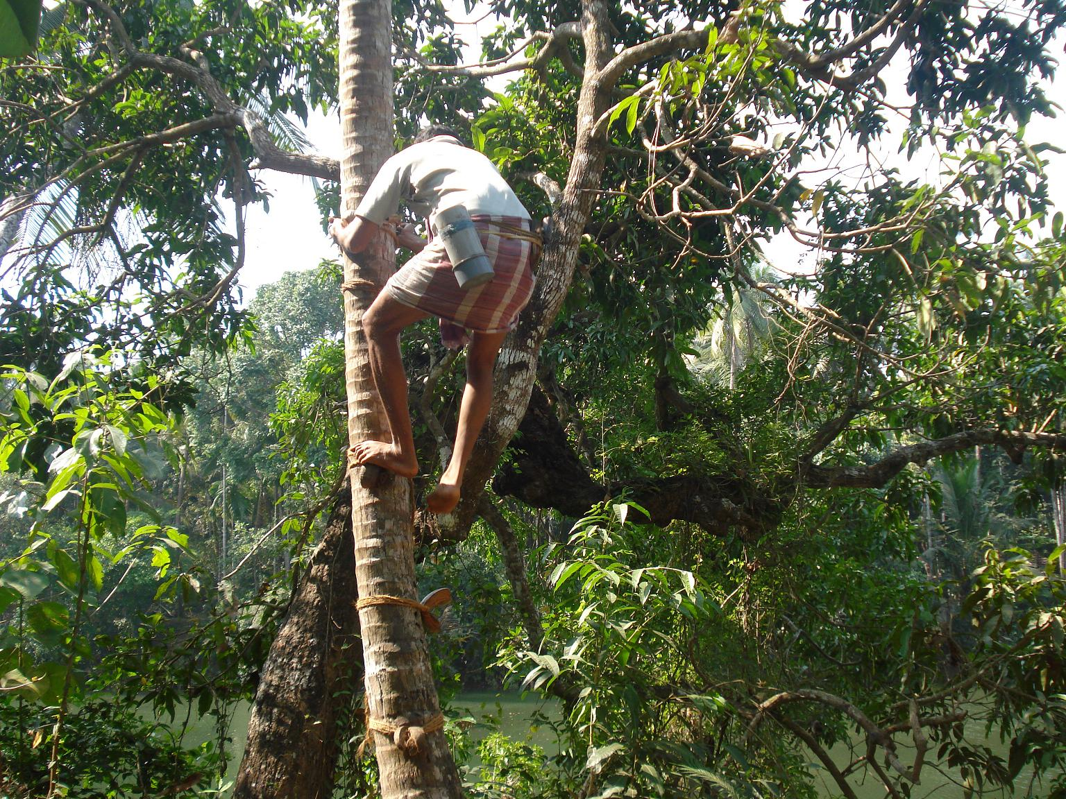 ചെത്ത് കഴിഞ്ഞശേഷം തെങ്ങിൽ നിന്ന് ഇറങ്ങുന്ന തൊഴിലാളി. തെങ്ങിൽ കയറിയിട്ട് വിടരാത്ത തെങ്ങിൻ പൂക്കുല മുറിക്കുമ്പോൾ ഒഴുകിവരുന്ന ദ്രാവകത്തിൽനിന്ന് നാടൻ പാനീയമായ കള്ള് നിർമ്മിക്കുന്നു.